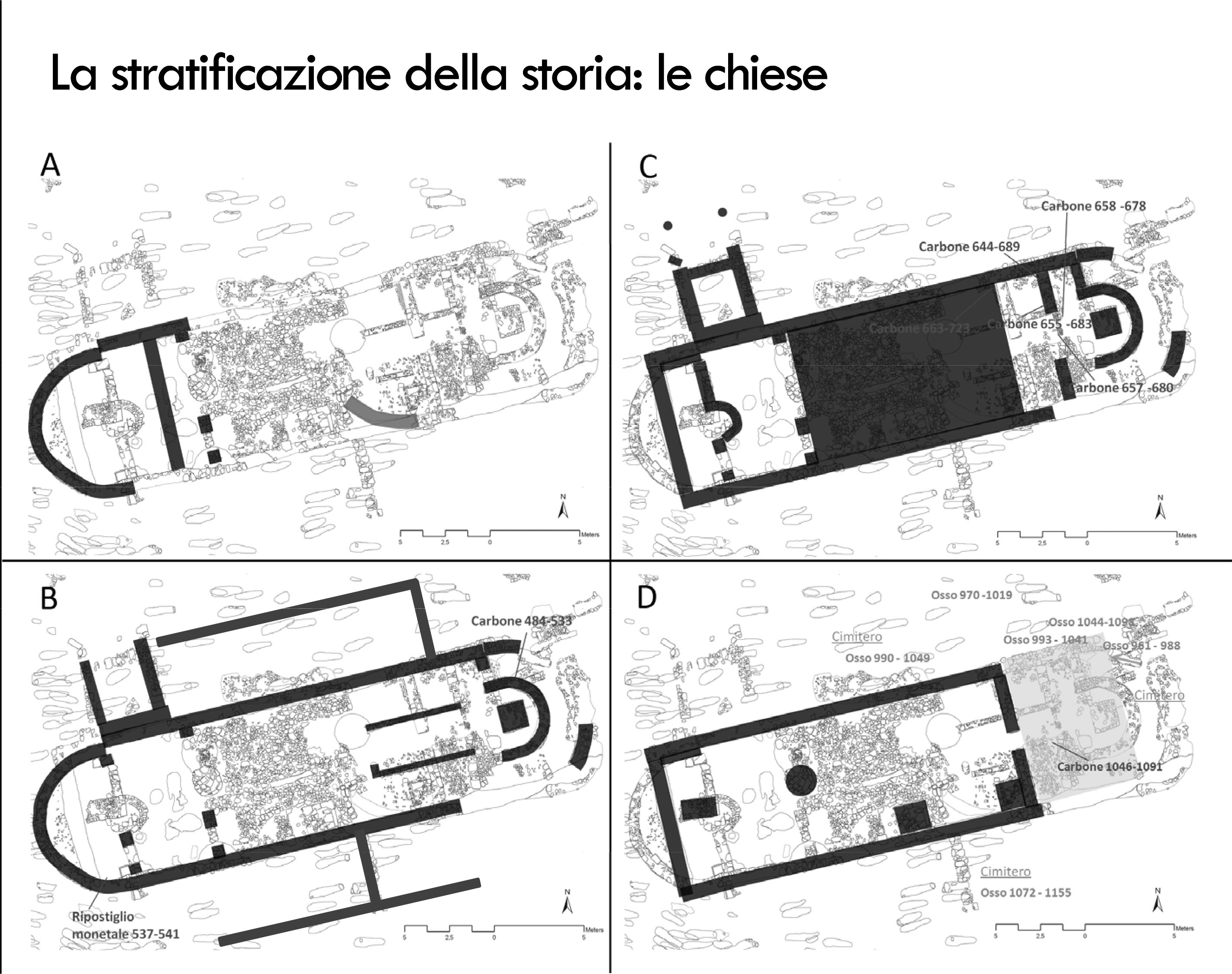 Ecco la cronologia delle varie fasi della chiesa della pieve di Pava.